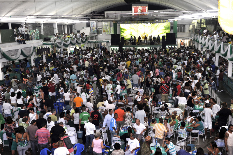 Feijoada Imperial na quadra do Império Serrano. Foto: Ricardo Almeida.